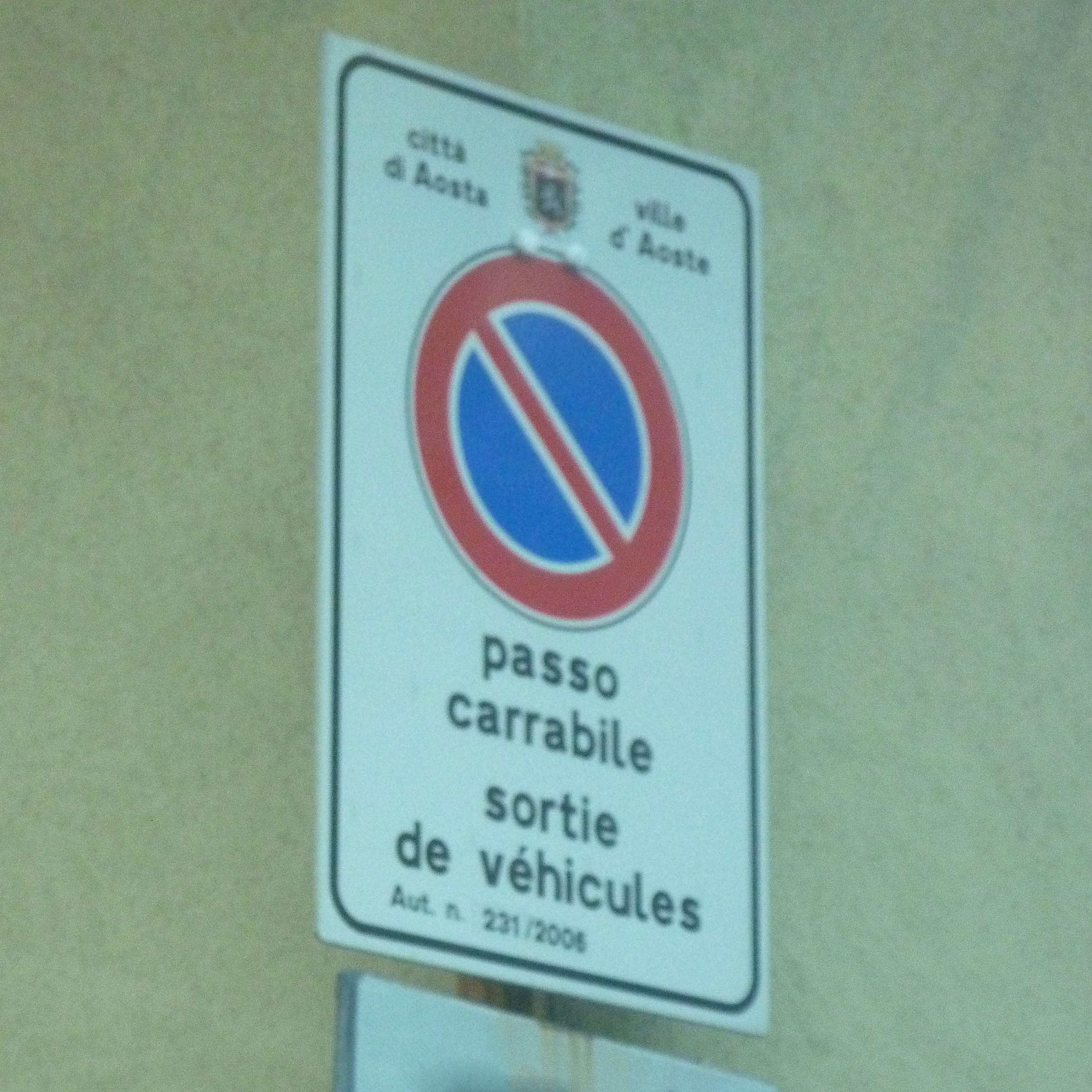 Panneau bilingue av. Garibaldi à Aoste